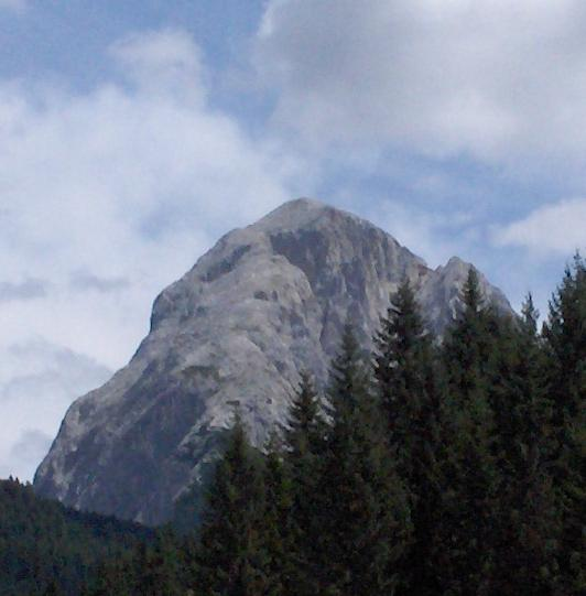 immagine del monte peralba scattata da Zinn 18:49:29, Ago 7, 2005 (CEST) Dichiaro di aver personalmente fotografato questo monte e di essere il proprietario del copyright di questa immagine che dono a Wikipedia.